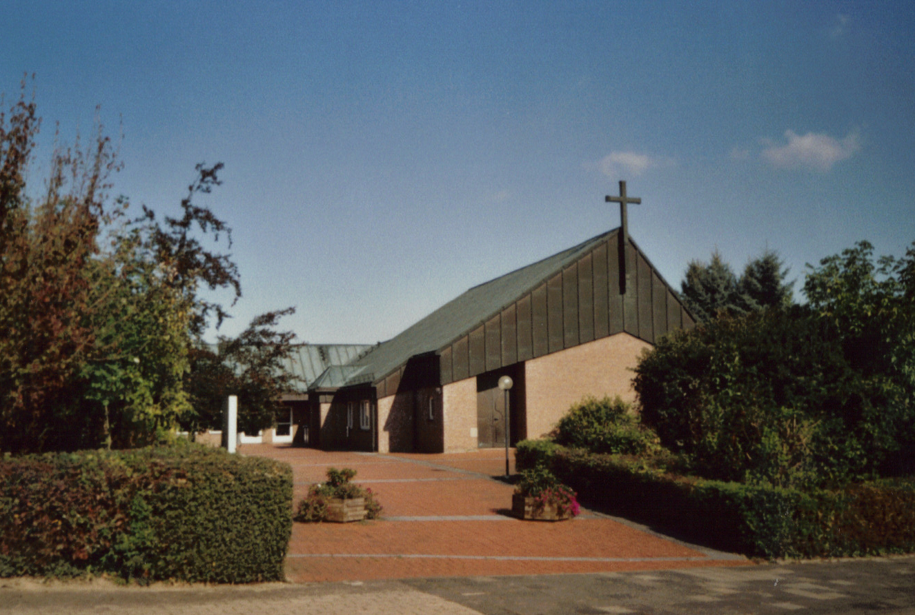 Erst 1983 bekam Hildesheim-Neuhof eine eigene Kirche